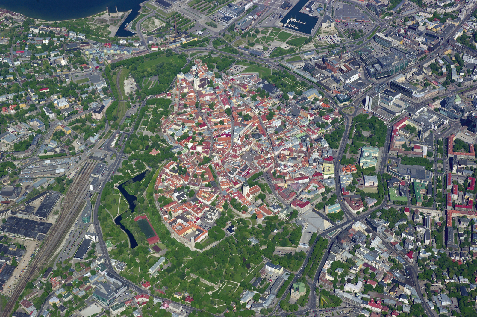 Õhuvaade Vanalinnale